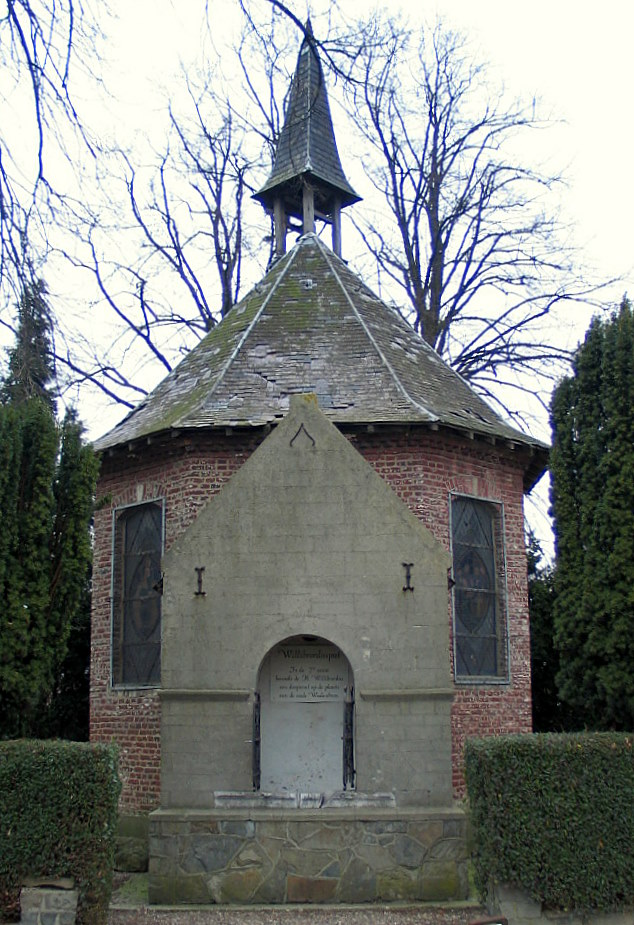 doopvont die door Willibrordus werd gebouwd ter vervanging van een Wodanput